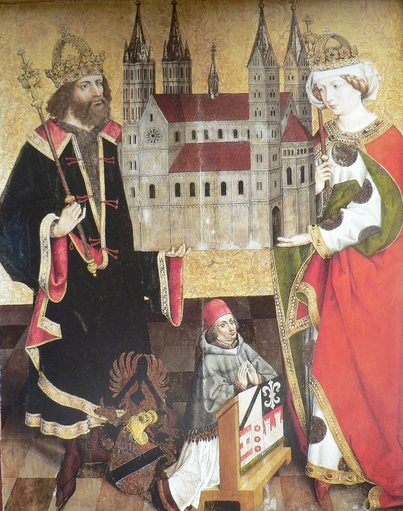 eigene Datei. Entstehungszeitraum um 1480, Auftraggeber Hertnid von Stein, Maler unbekannt